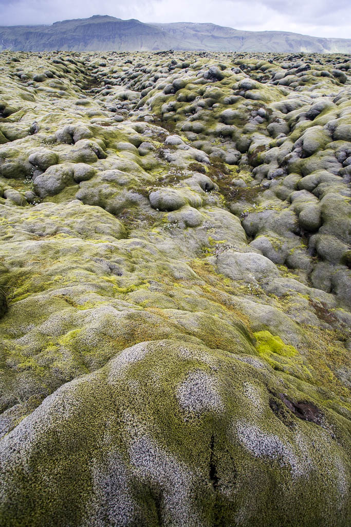 Campo de lava cubierto por musgo en Eldhraun, PN Skaftafell